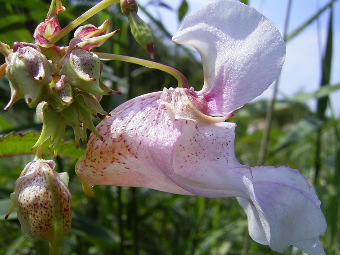 den Haag, de uithof, augustus 2004